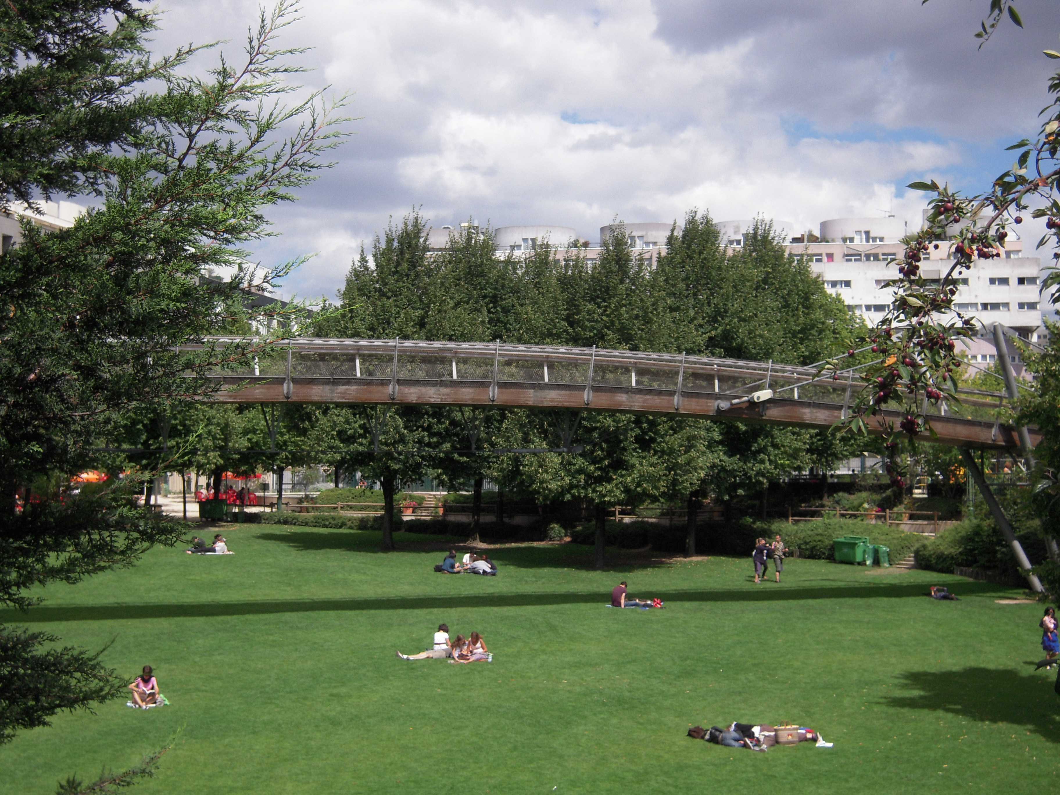 Au niveau de la rue Montgallet et de la mairie du 12e arrondissement, la promenade plantée enjambe le jardin de Reuilly par la passerelle BZ/12